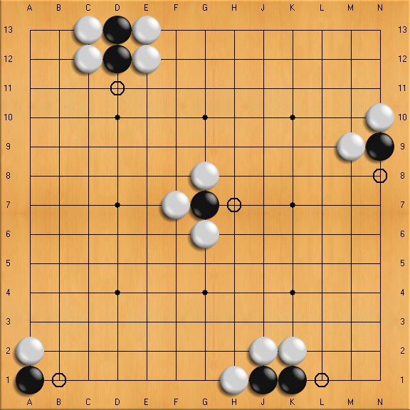 Captura en el juego del Go Imagen creada con qGo generada a partir de la imagen albergada en la wikipedia española